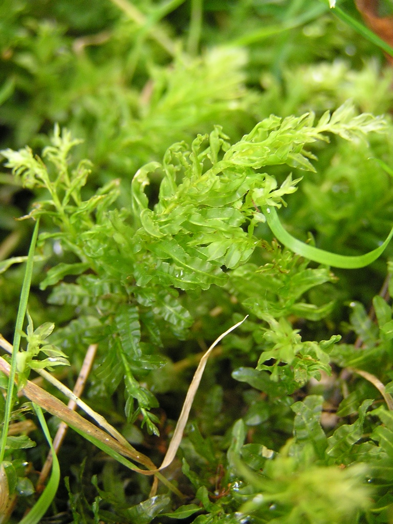 Plagiomnium undulatum in Bonn.